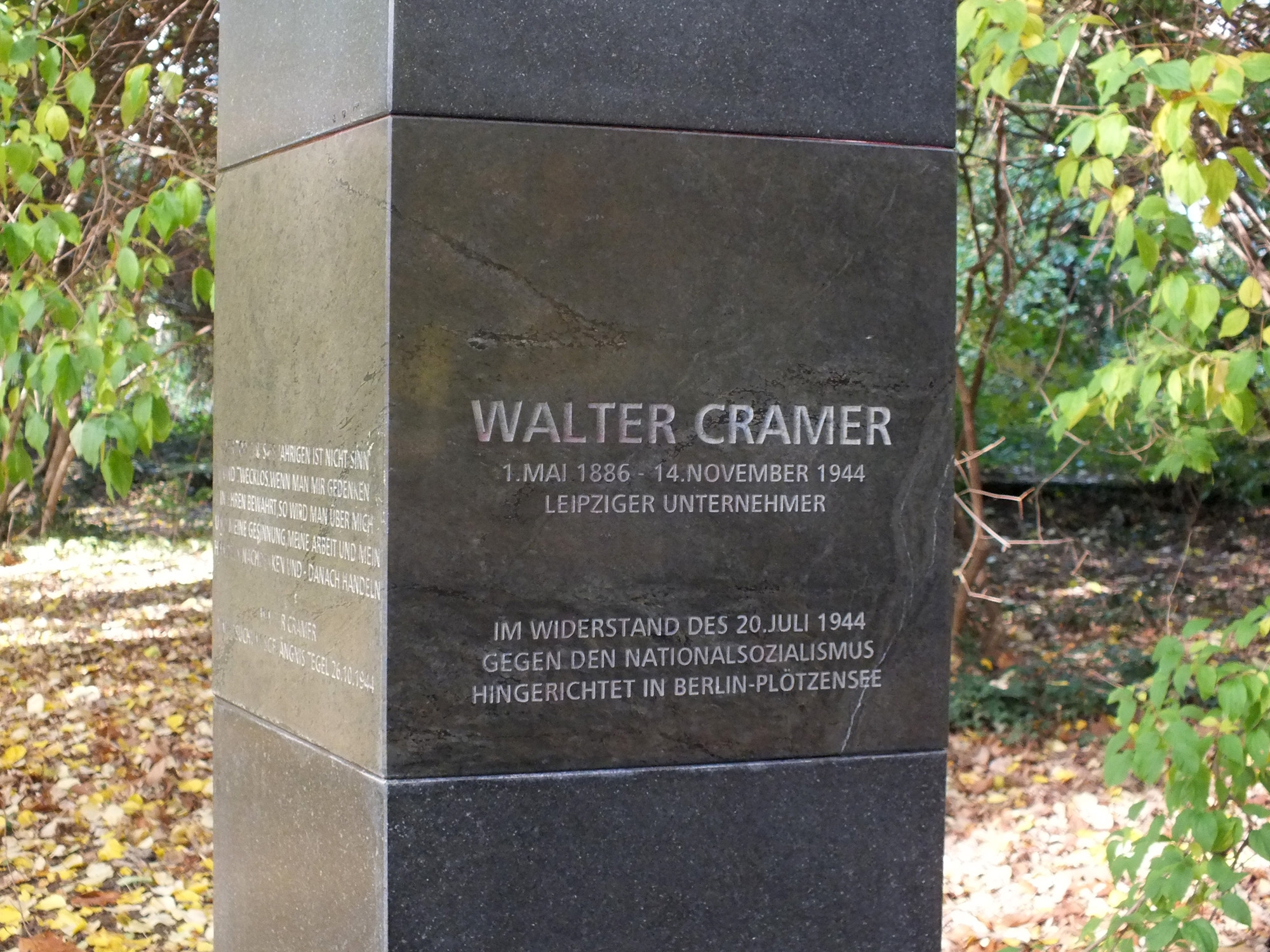 Ausschnitt aus der Stele für Walter Cramer im Leipziger Johannapark, Bildhauer: Klaus Friedrich Messerschmidt